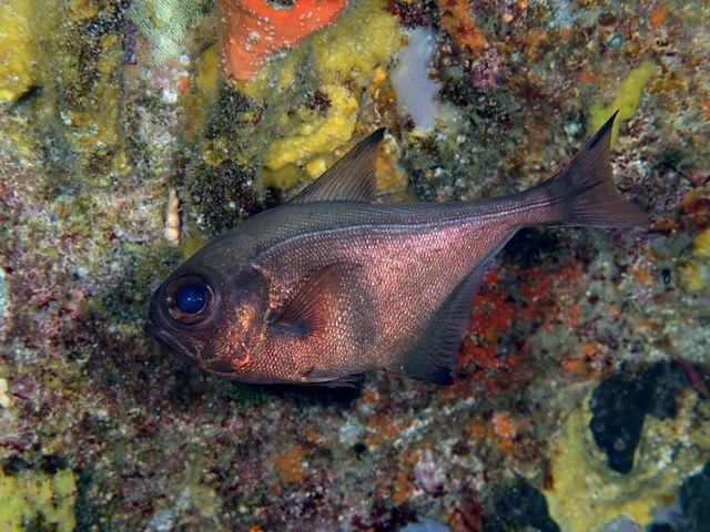 ツマグロハタンポ Pempheris japonica